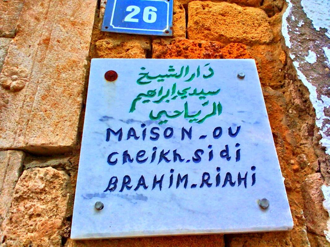 La médina de Tunis مدينة تونس العتيقة